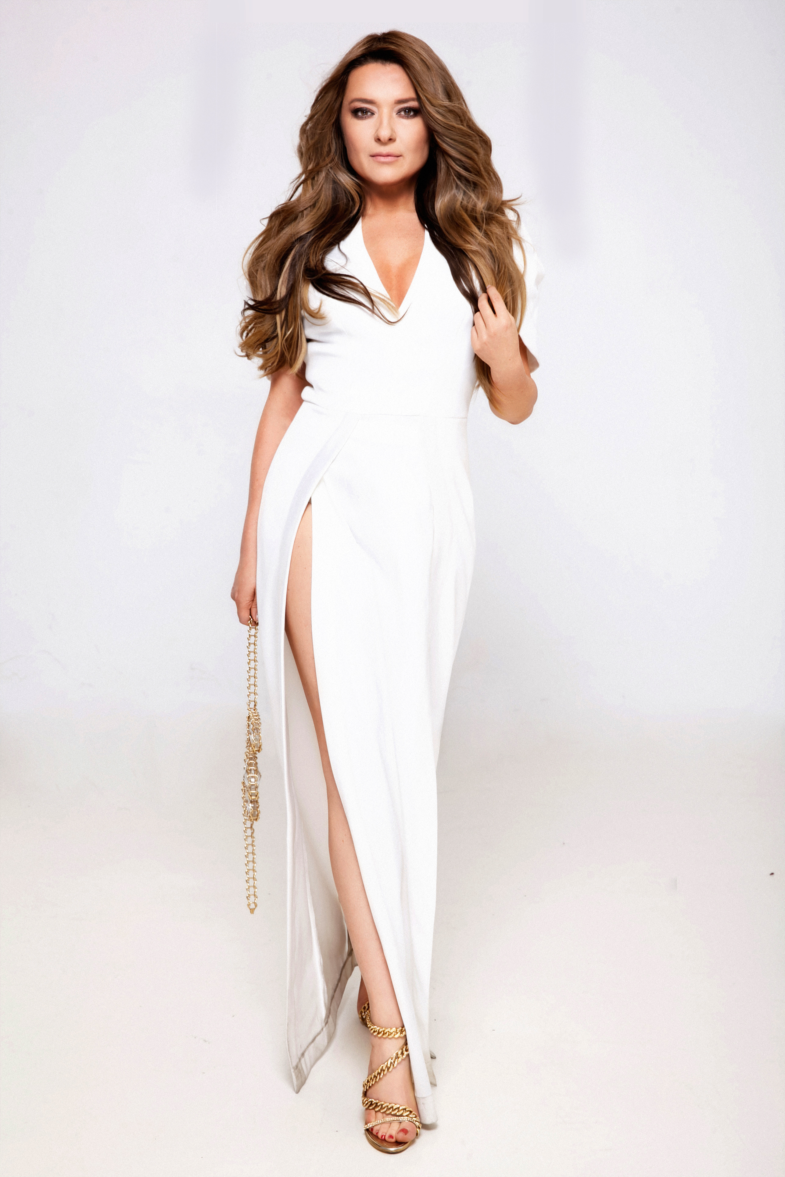 Наталія Могилевська